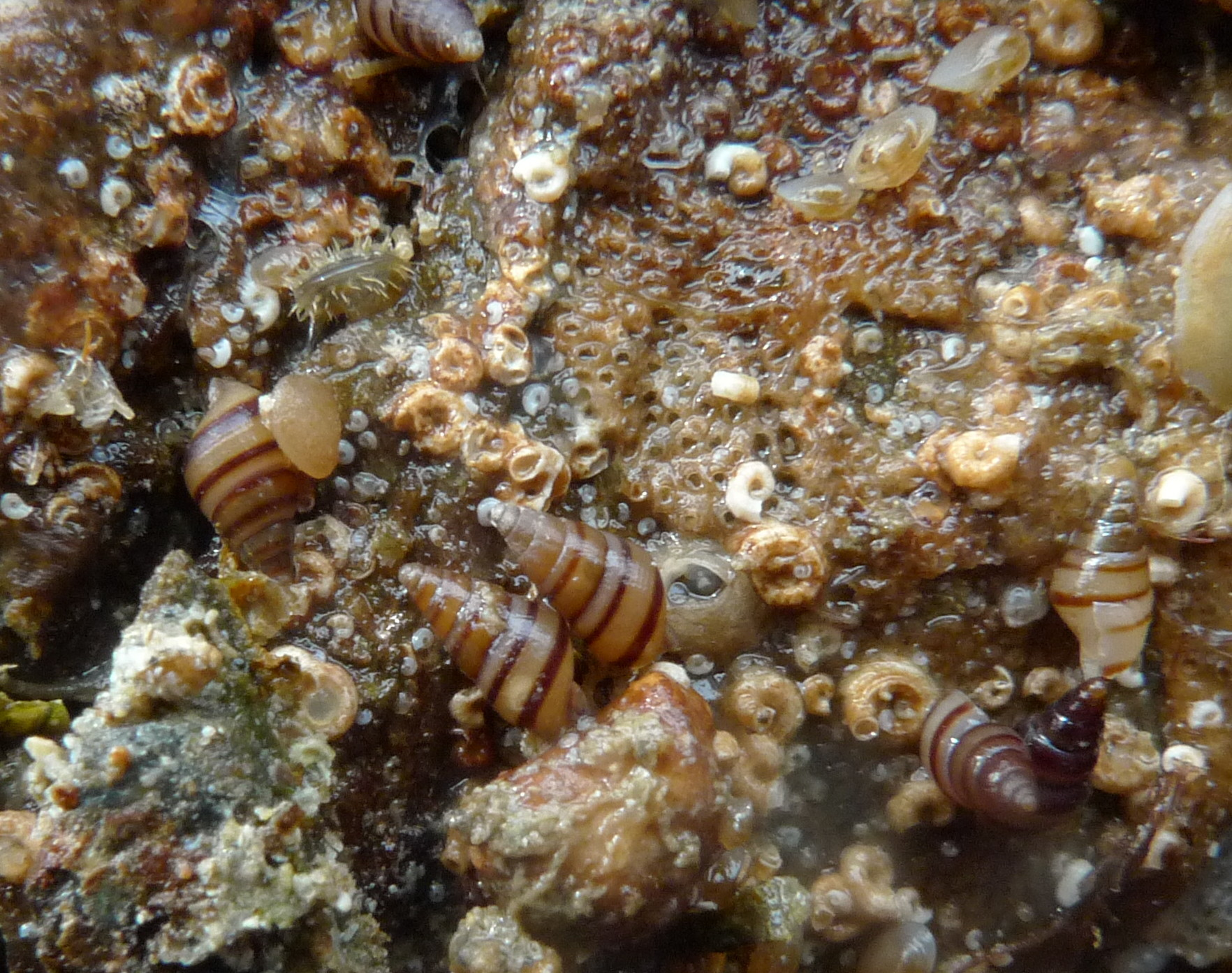 Cingula trifasciata (J. Adams, 1800) (synonym: Cingula cingillus, Porh Yoc'h - Belle-Île (Le Palais, Morbihan, Bretagne, France)